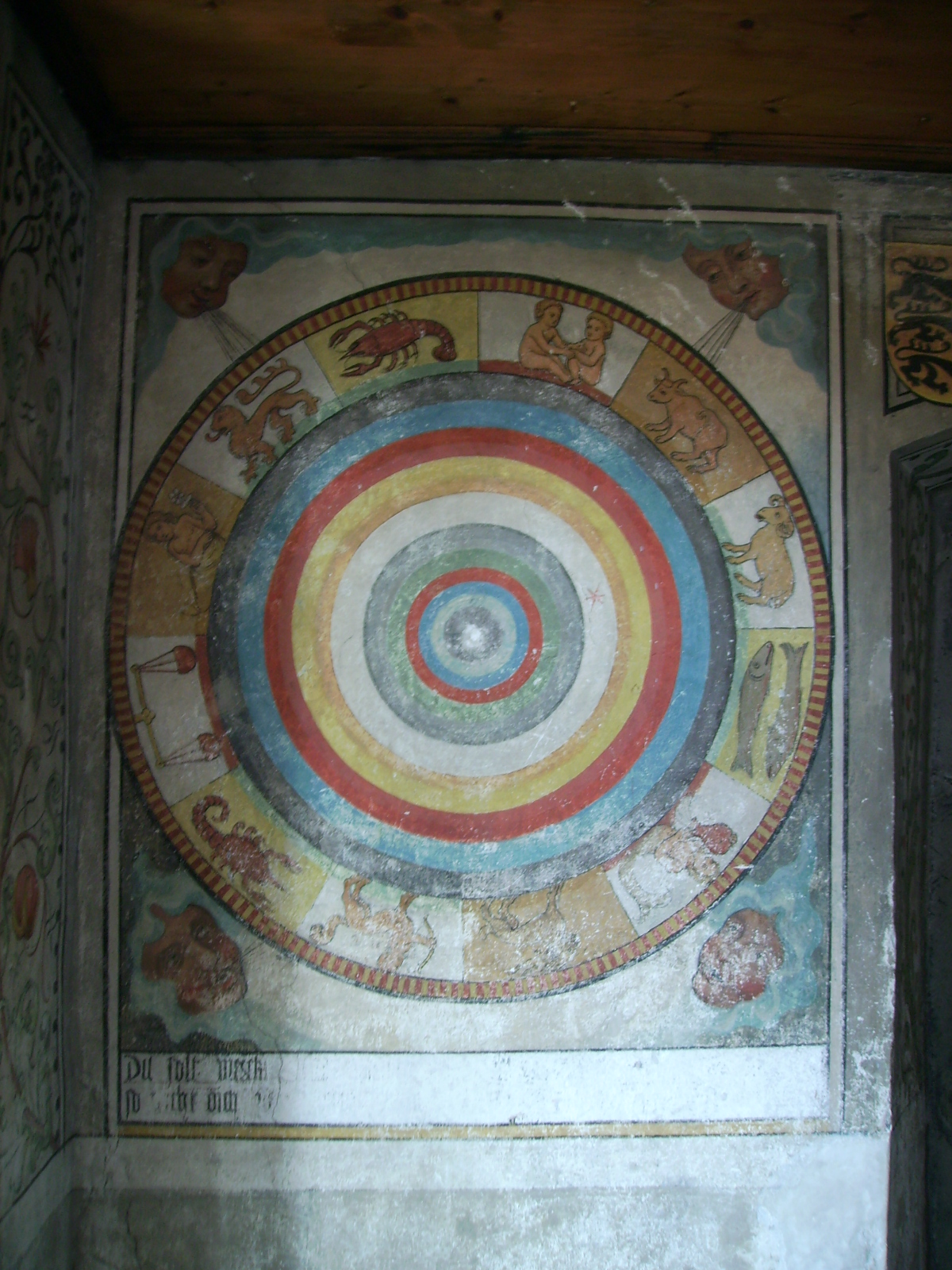 Geozentrisches Weltbild mit Planetenbahnen und Tierkreiszeichen. Das Kloster St. Georgen war eine Benediktinerabtei in Stein am Rhein im Kanton Schaffhausen, Schweiz. Schutzpatrone des Klosters waren St. Georg und St. Cyrill. Es handelt sich um eine der am besten erhaltenen mittelalterlichen Klosteranlagen der Schweiz.